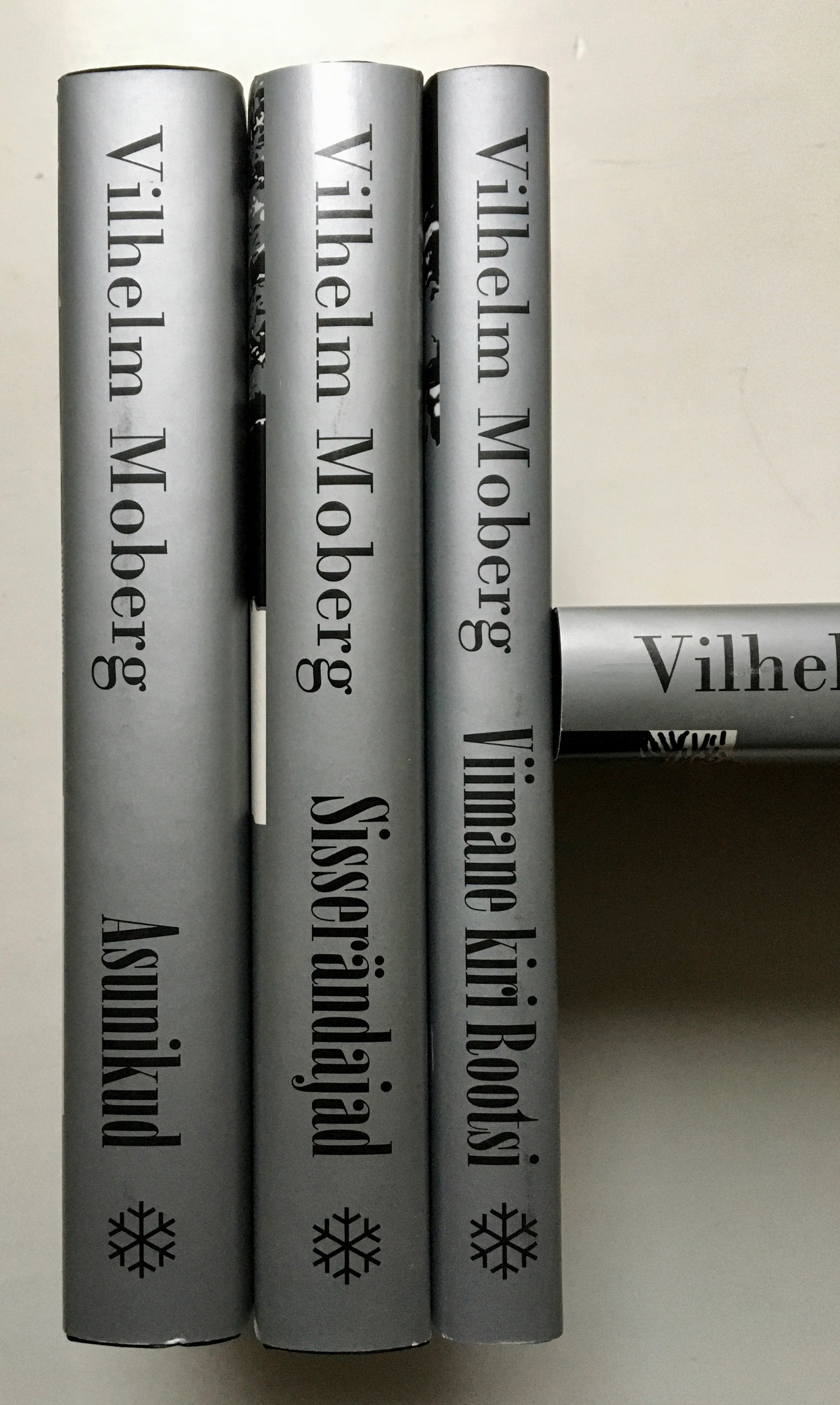 PR Moberg seljad